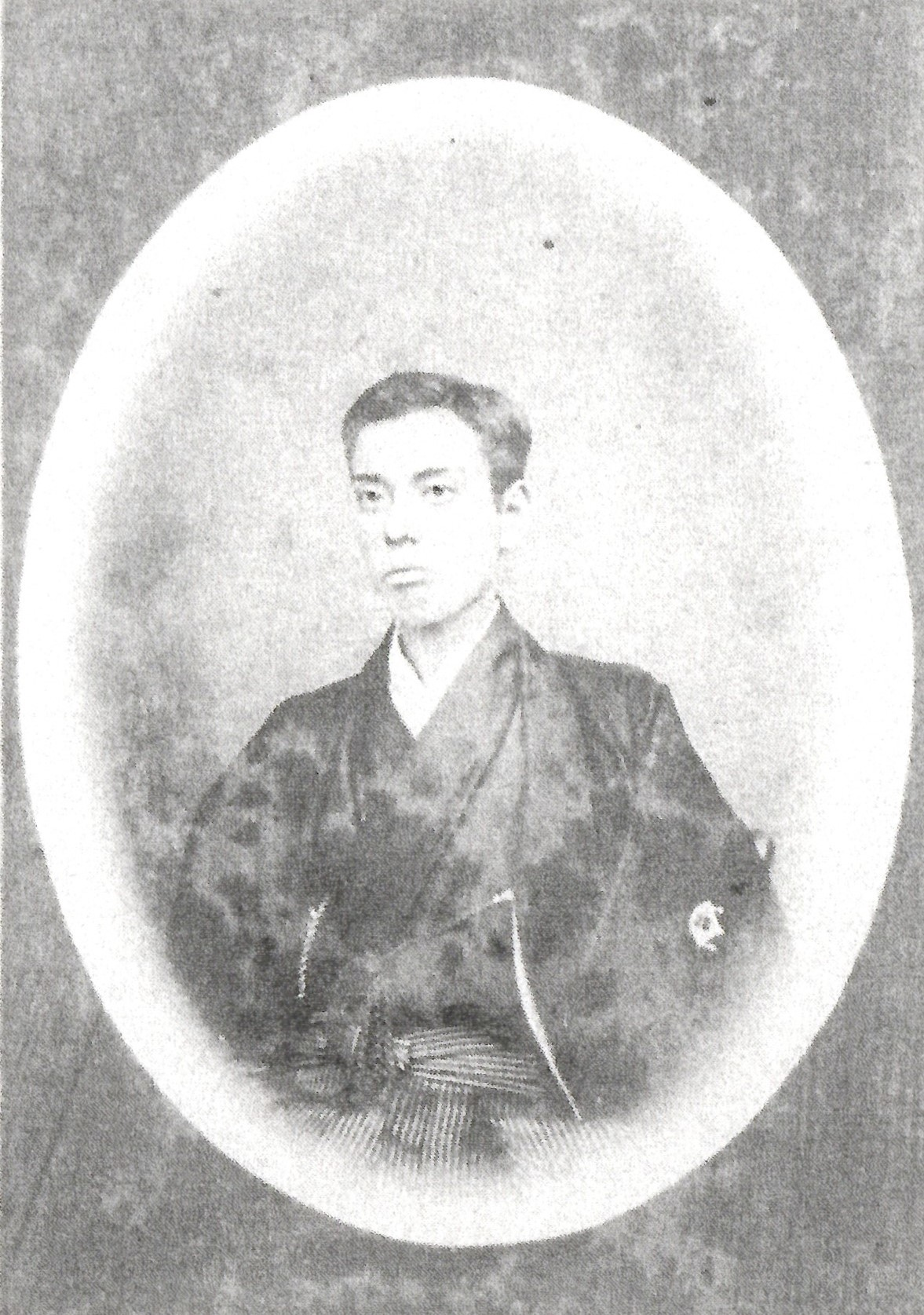 山崎治祇の肖像写真。